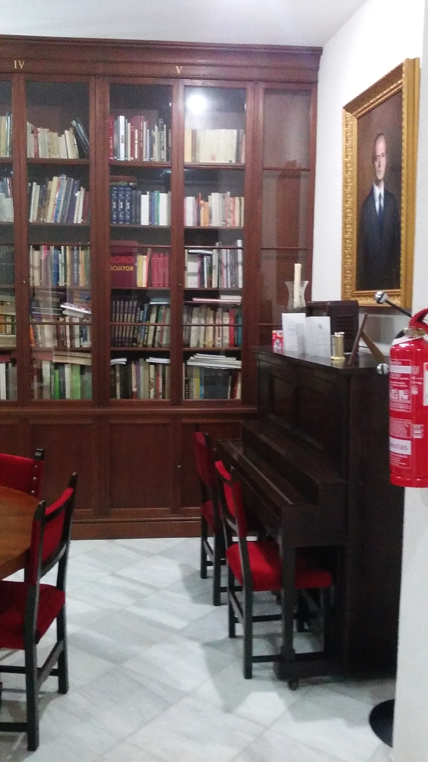 Real Academia San Dionisio de Ciencias, Artes y Letras de Jerez de la Frontera